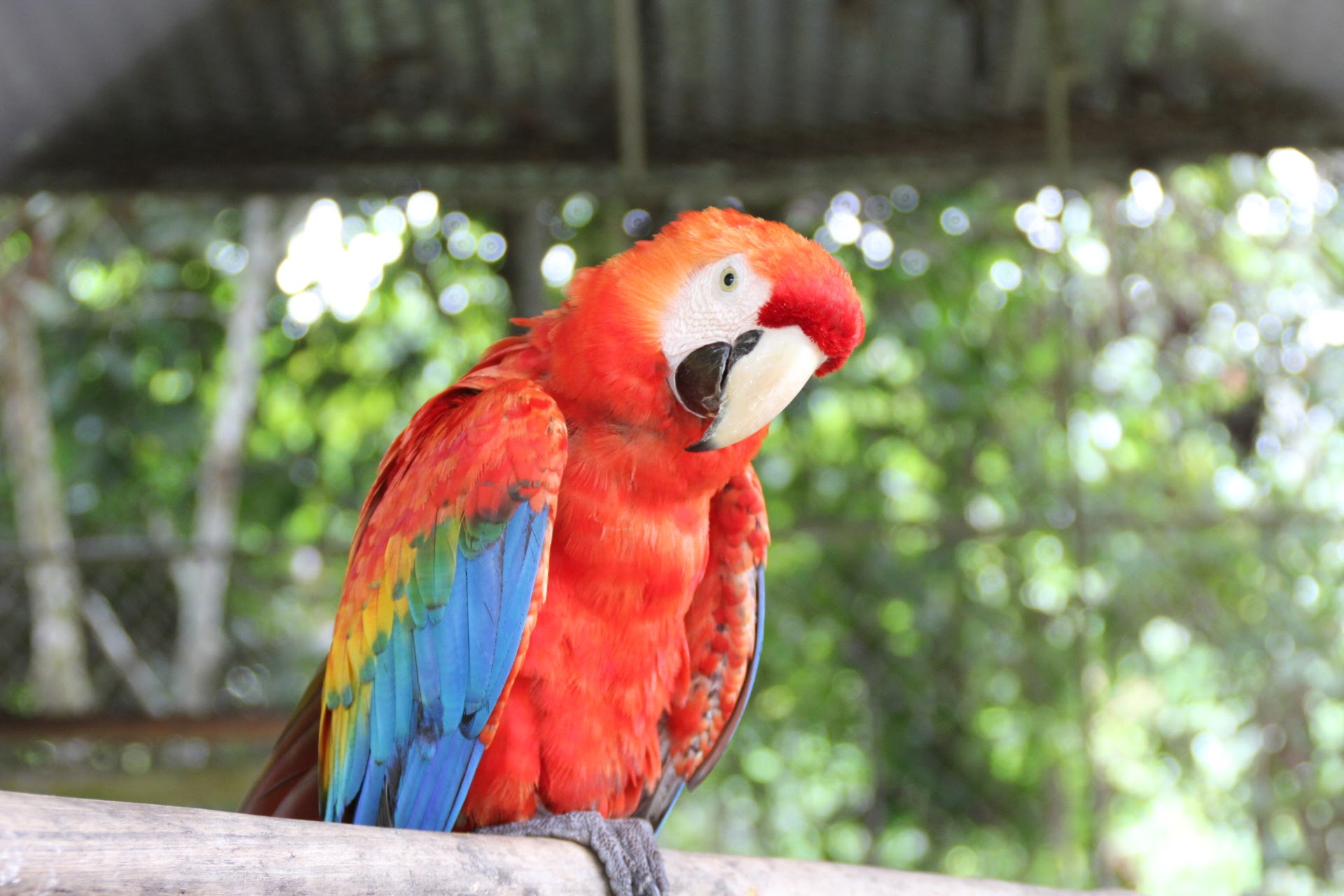 Guacamaya - Ara Chloropterus